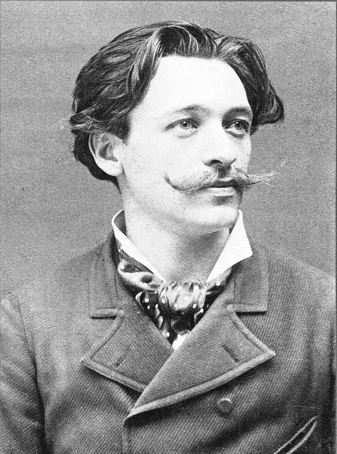 Portrait photographique d'Émile Cohl (1857-1938). Publié en couverture du livre cité en source ( scan de cette reproduction.